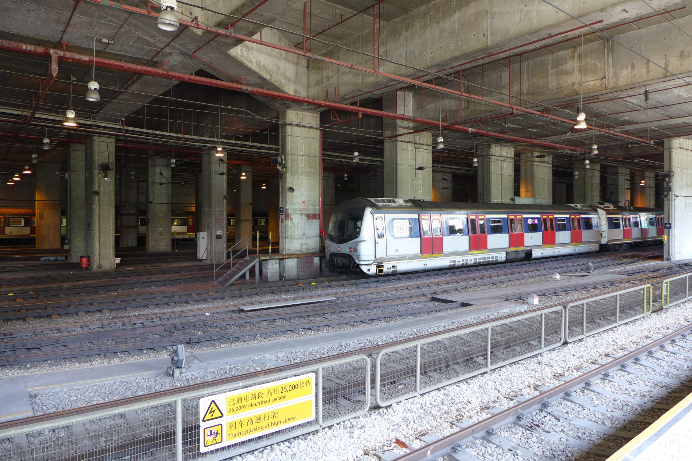 MTR Ho Tung Lau Depot View